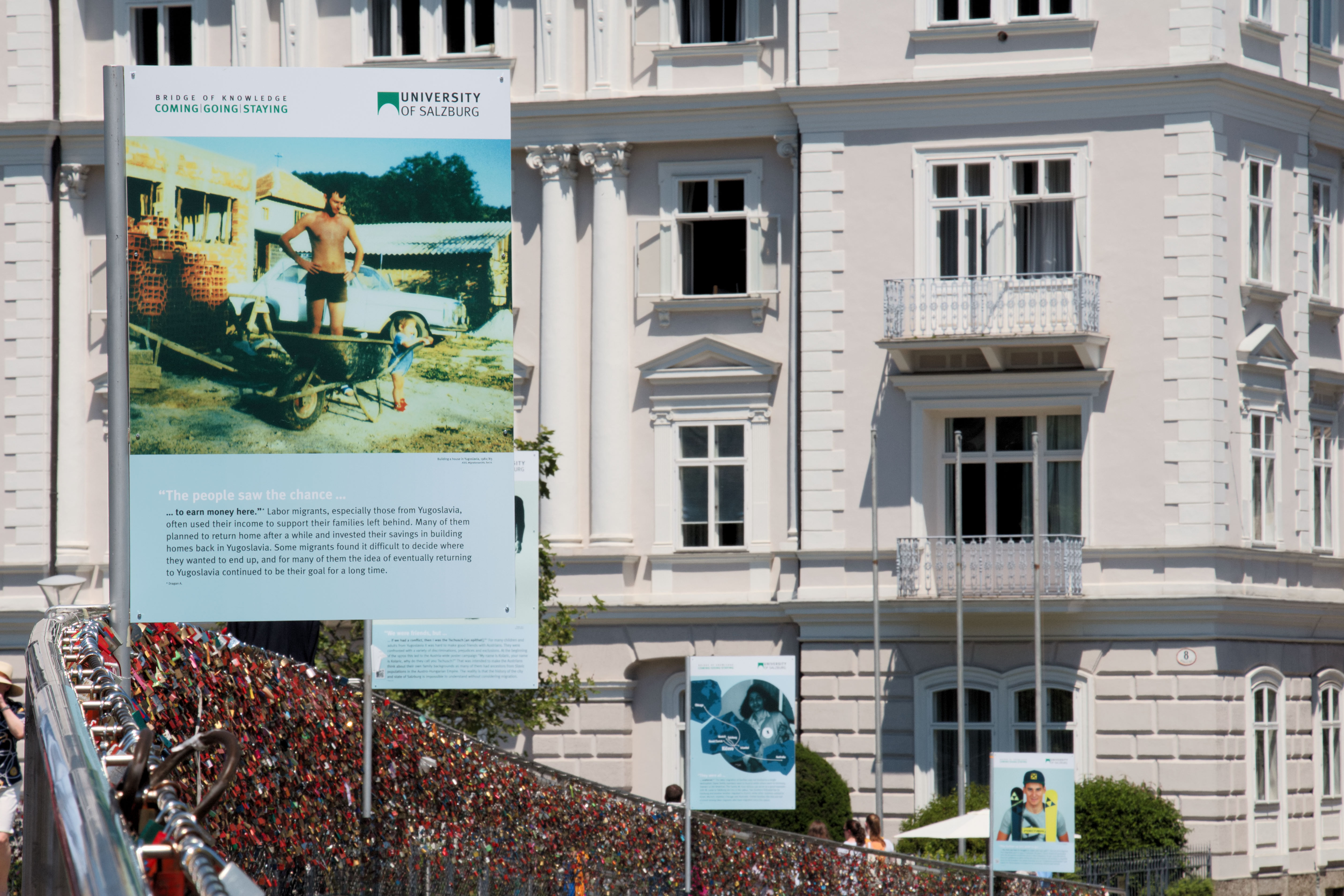 Die Poster-Ausstellung "Wissensbrücke" am Salzburger Makartsteg im Sommer 2016 zum Thema Gastarbeiter, veranstaltet gemeinsam von der Stadt Salzburg und der Universität Salzburg.